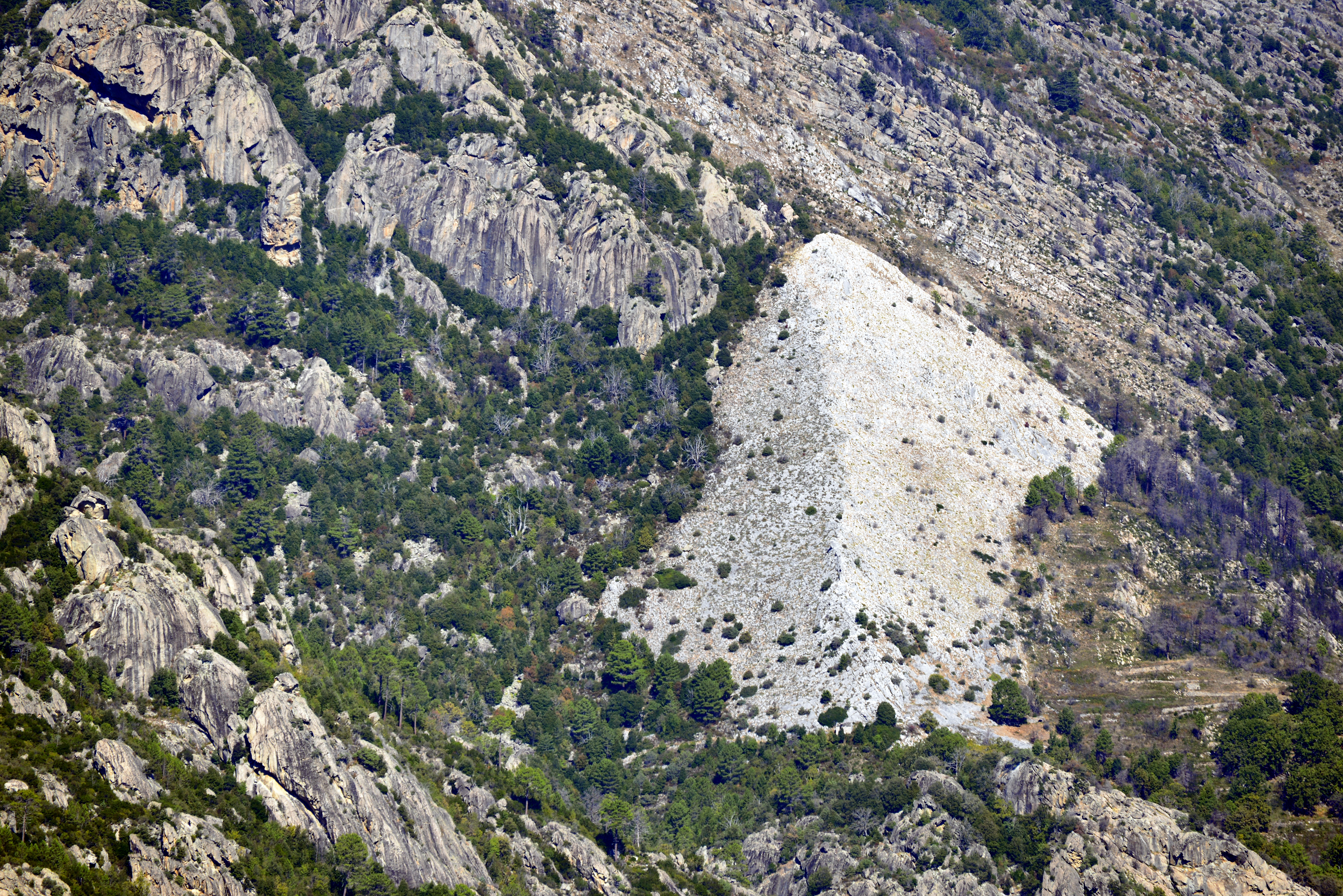 Venaco, Centr-Corse (Haute-Corse) - Le Razzo-Bianco (Razzu biancu), grand cône blanc à flanc de montagne dominant le pont du Vecchio et visible à la ronde. Autrefois y était exploitée une carrière de marbre d'un blanc gris à reflets violacés et un autre d'un gris noir avec veinules dorées.